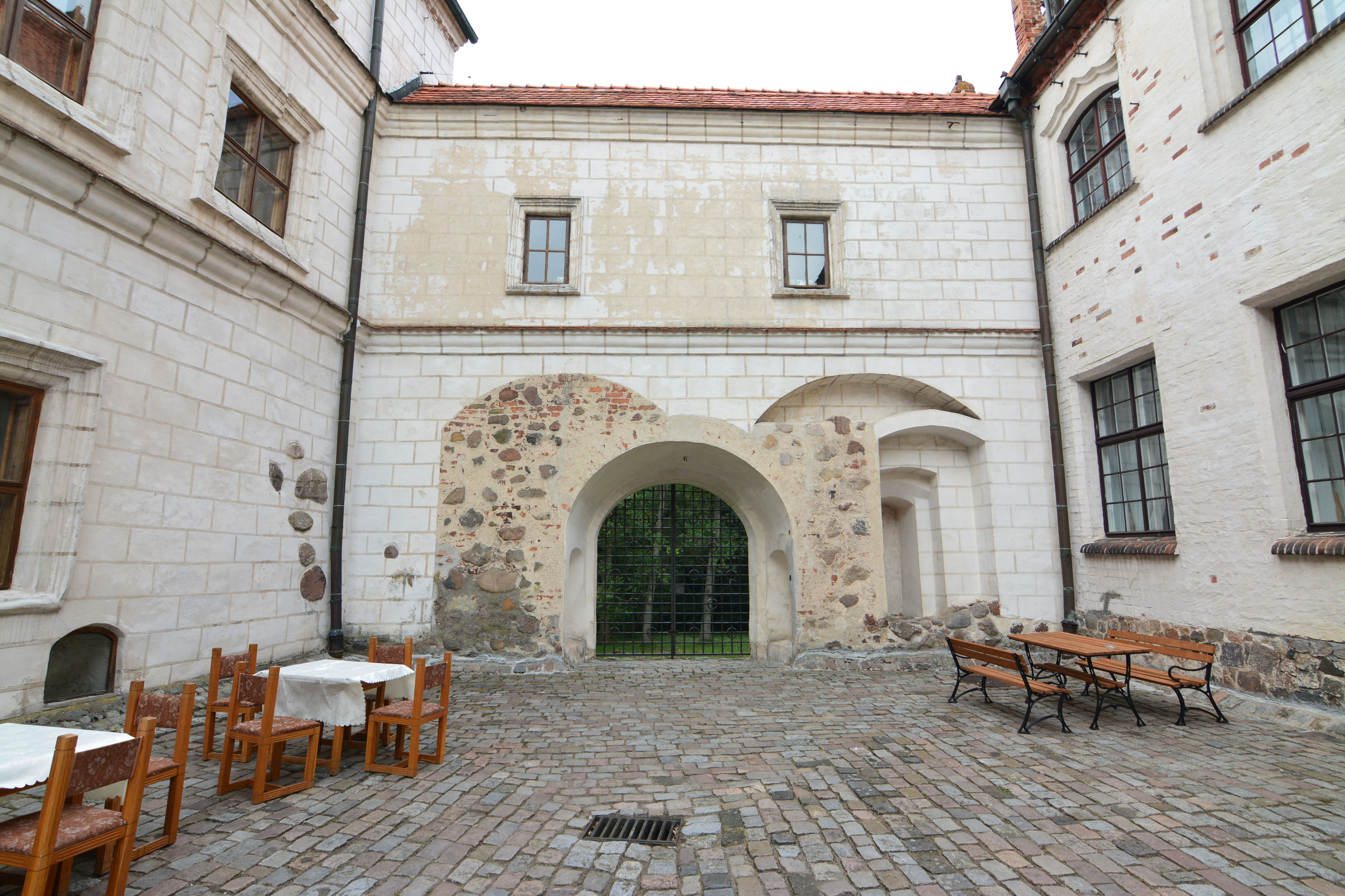 Pęzino - zamek, XIV, 1 poł. XVI, 1600, XIX